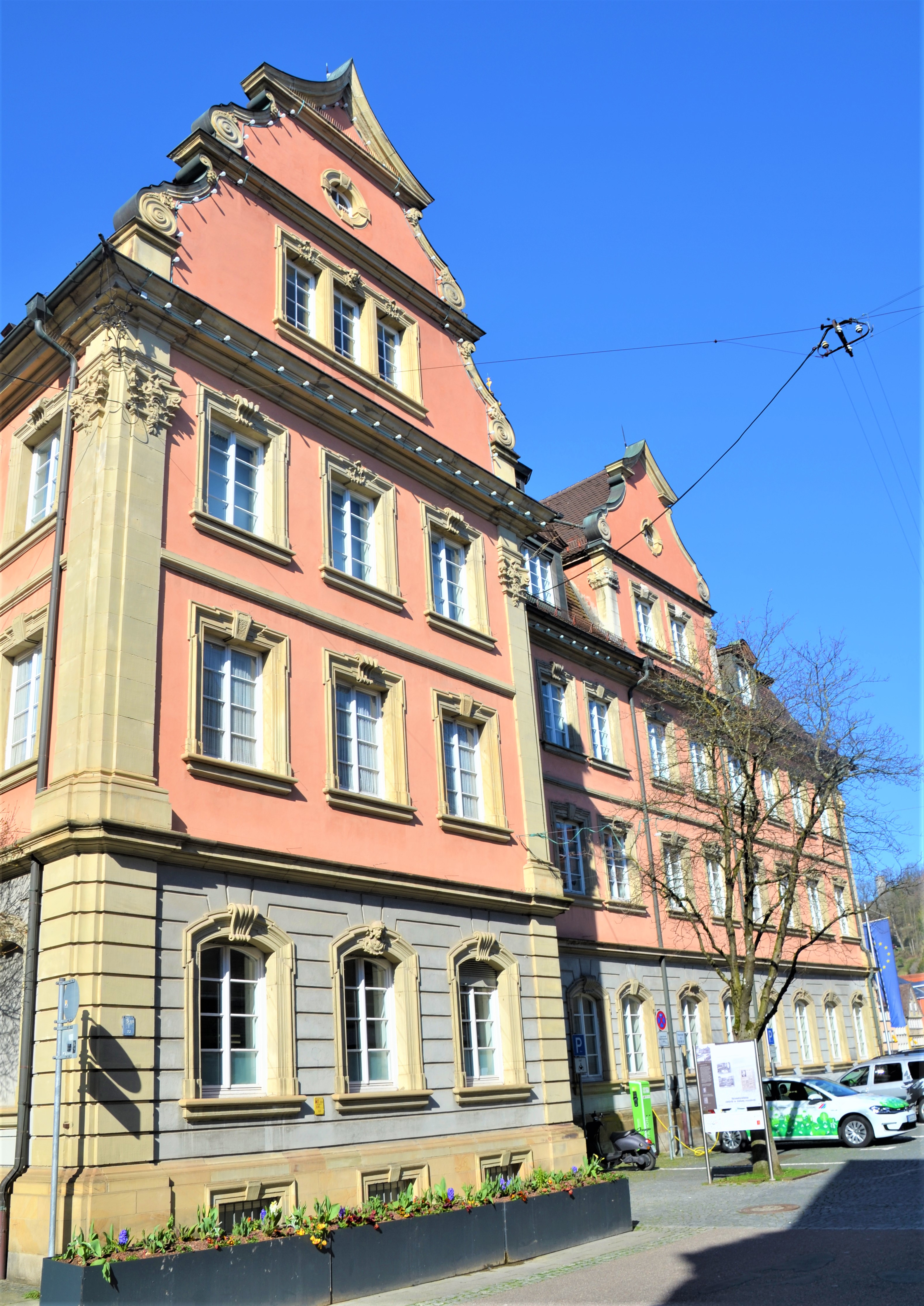 Rathaus Gmünd, Ansicht Kornhausgasse